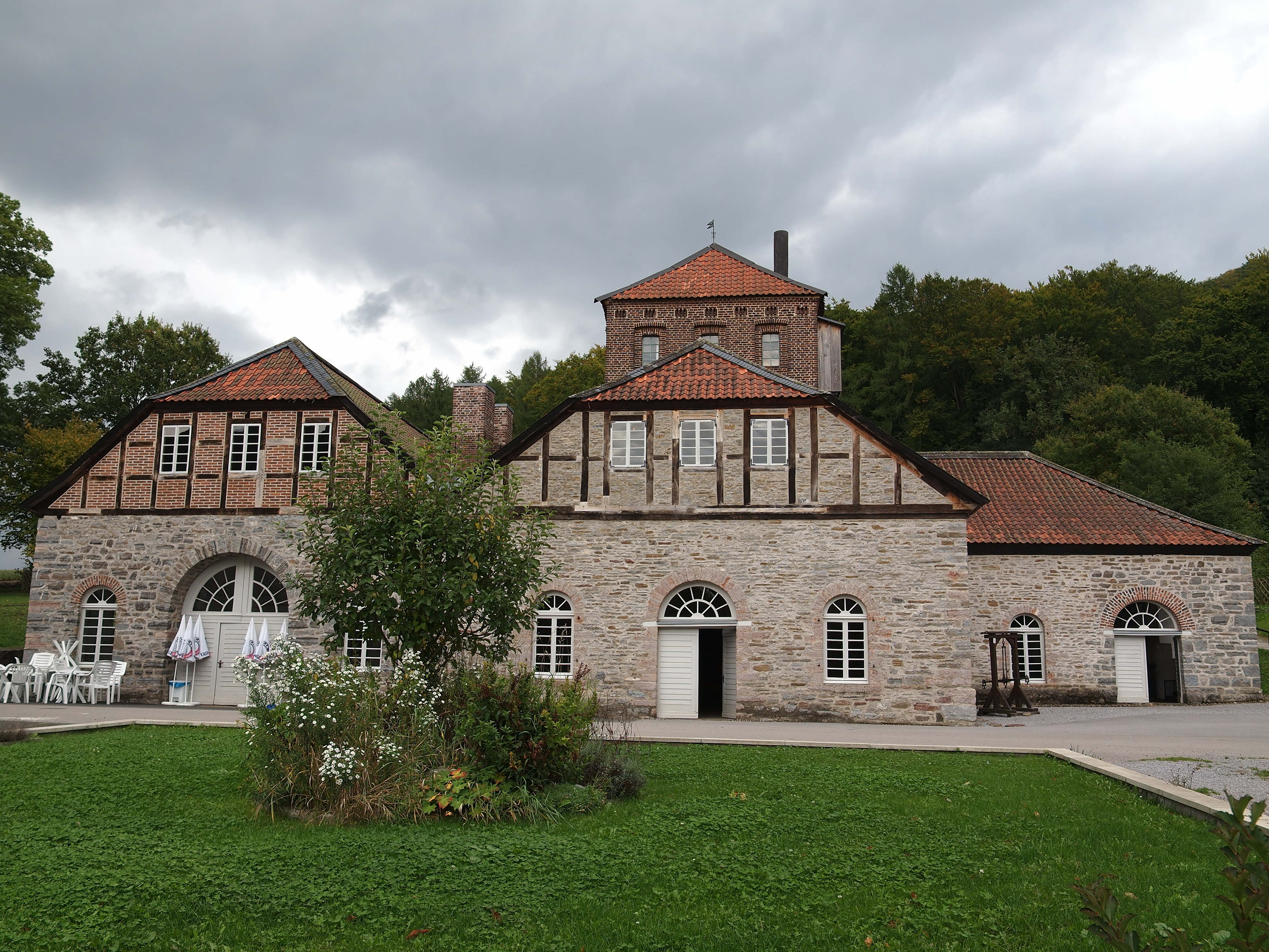 Balve, Luisenhütte Wocklum - Ansicht der Gebäude von Westen